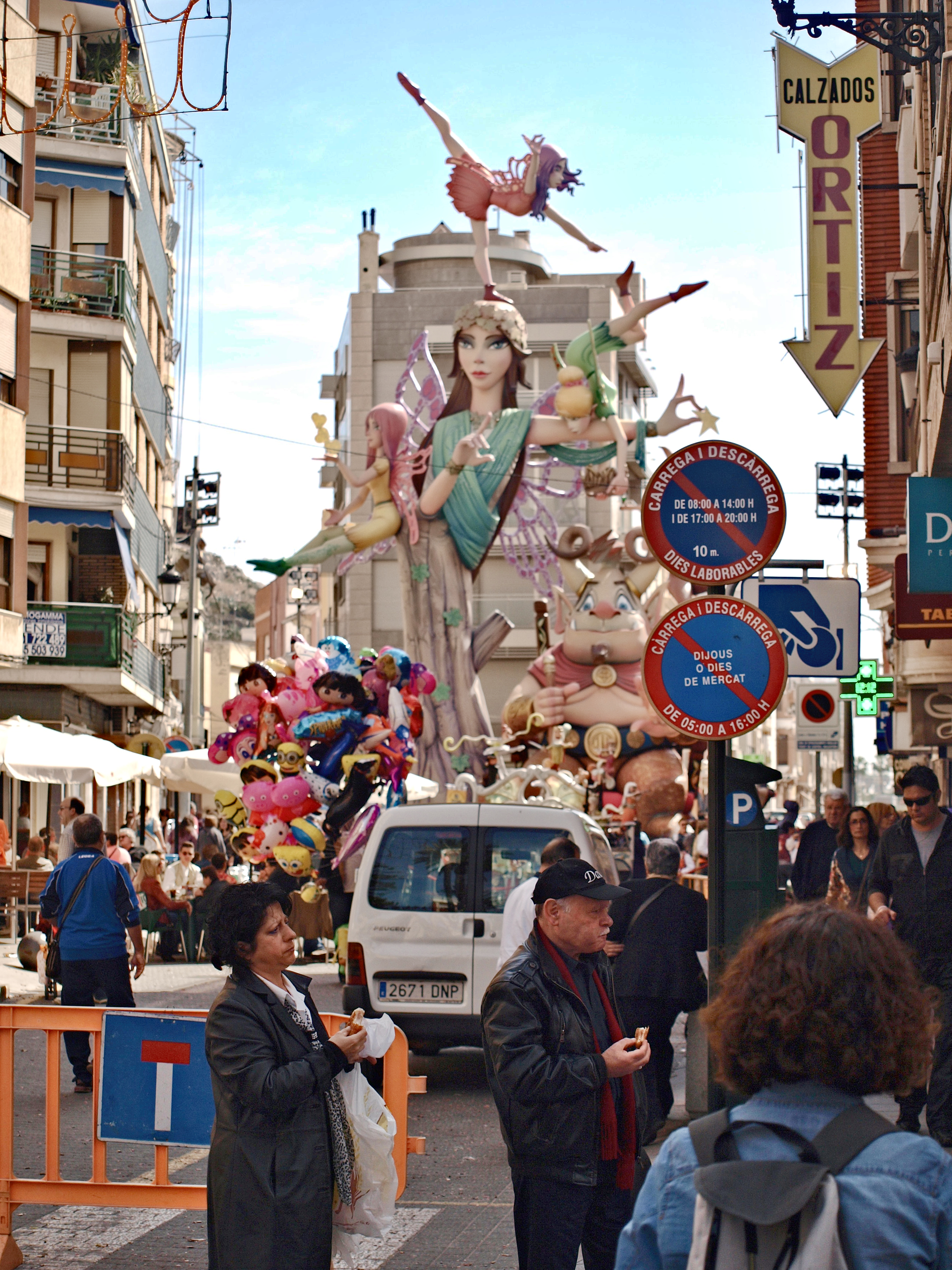 monument de la Falla Plaça La Taüt de Cullera, Primer Premi de la Secció Especial de 2014 This is a photography of a Folklore festival in Spain (Wikidata id Q23663326).